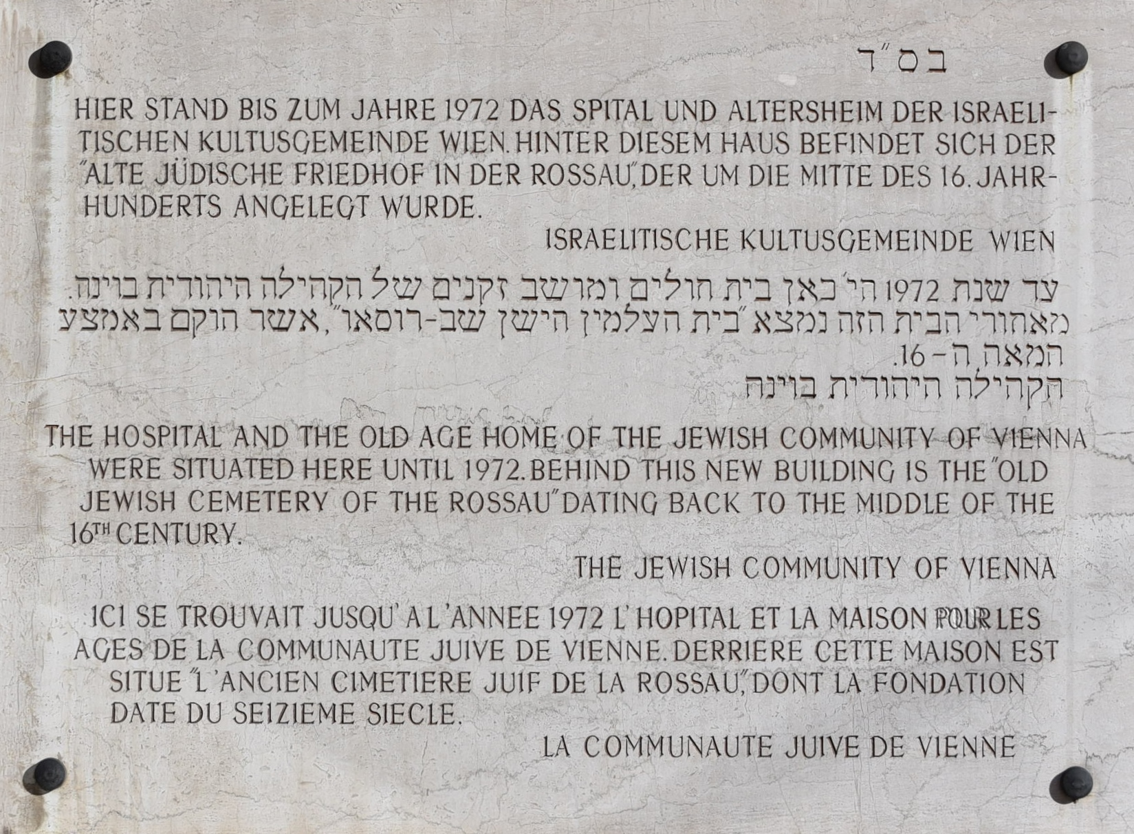 Gedenktafel für das Spital und Altersheim der israelitischen Kultusgemeinde Seegasse